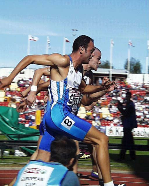 Coppa Europa Gateshead 2000